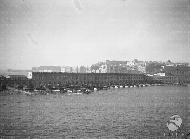 Napoli - Molo di San Vincenzo, sommergibili. Autore sconosciuto (Istituto Luce).